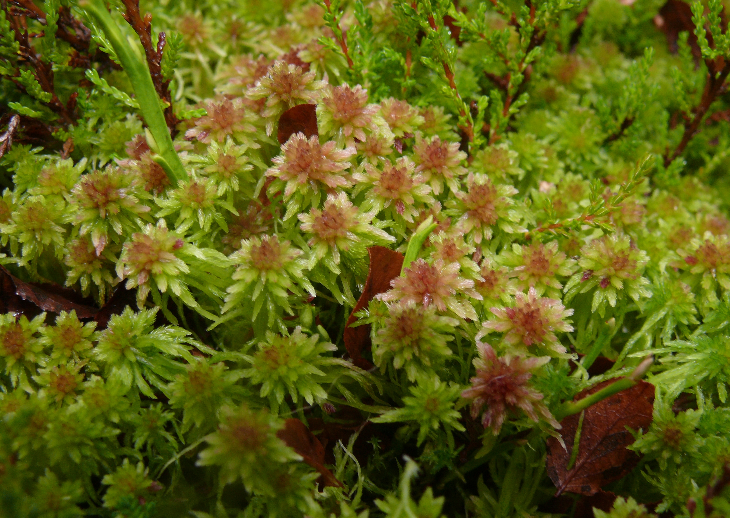 Sphagnum sp., Virngrund, Germany